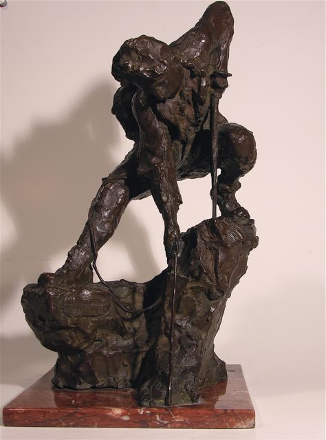 "La Guida" par Titta Ratti